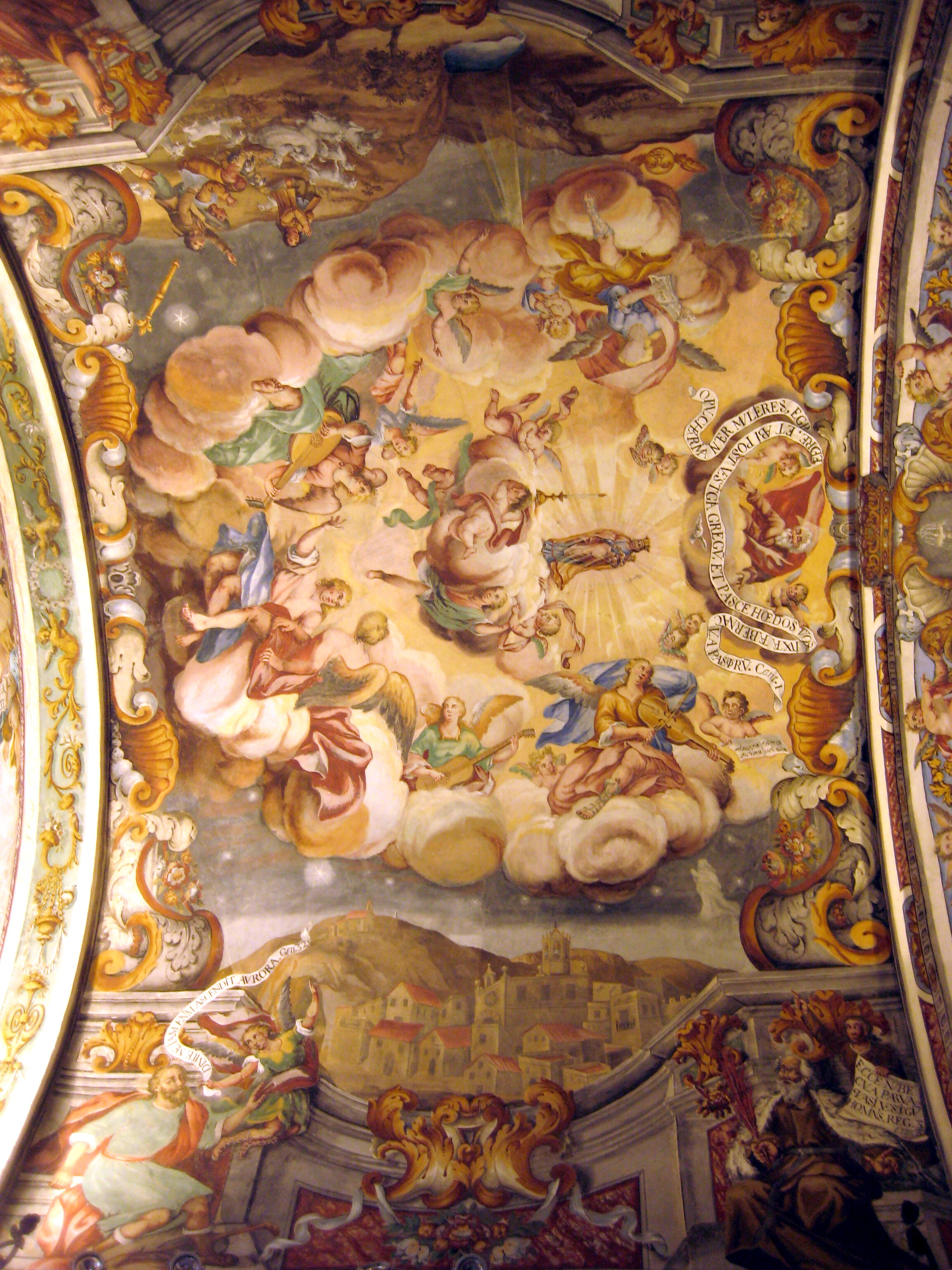 Volta del presbiteri del Santuari de la Mare de Déu de la Font de la Salut de Traiguera (Baix Maestrat)